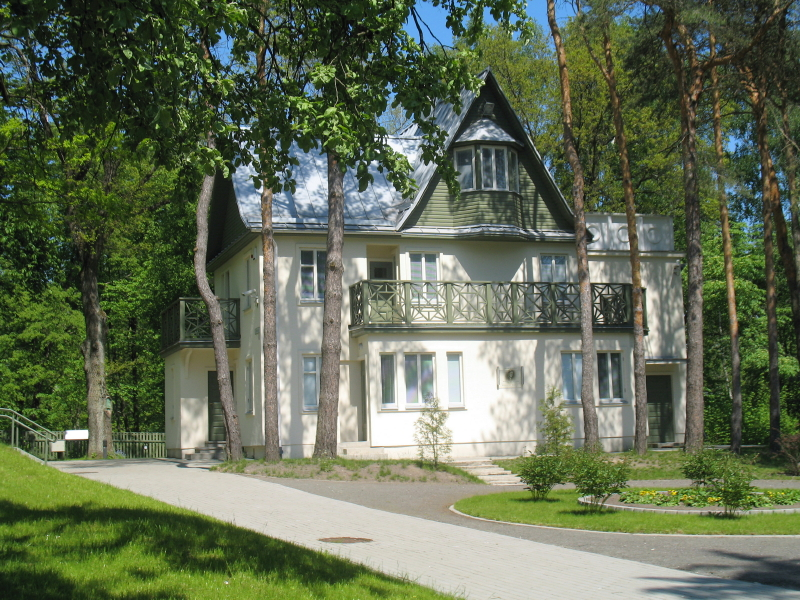 Salomėjos Nėries namas-muziejus Palemone, Kaunas.